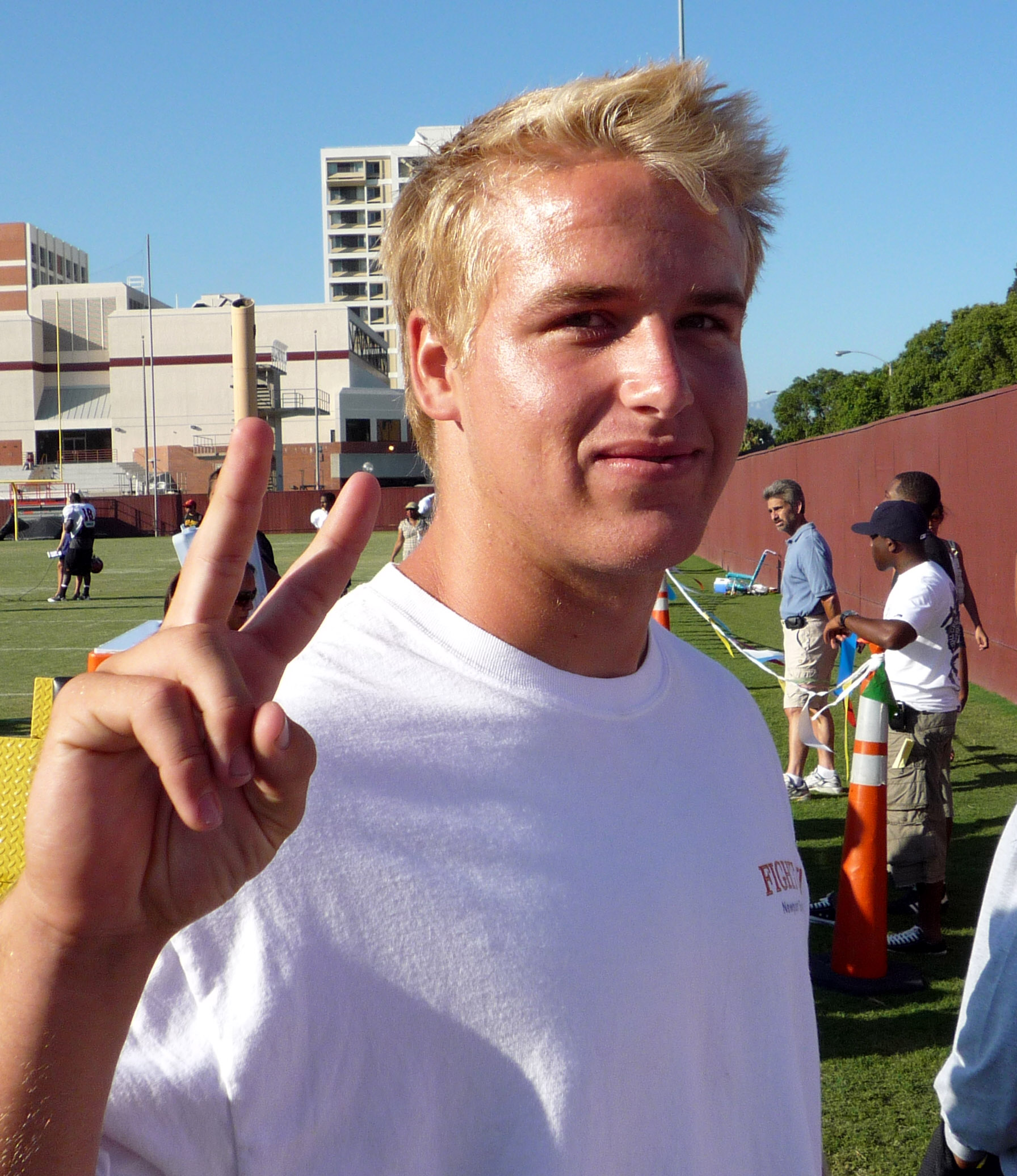 Matt Barkley Being A Jurk